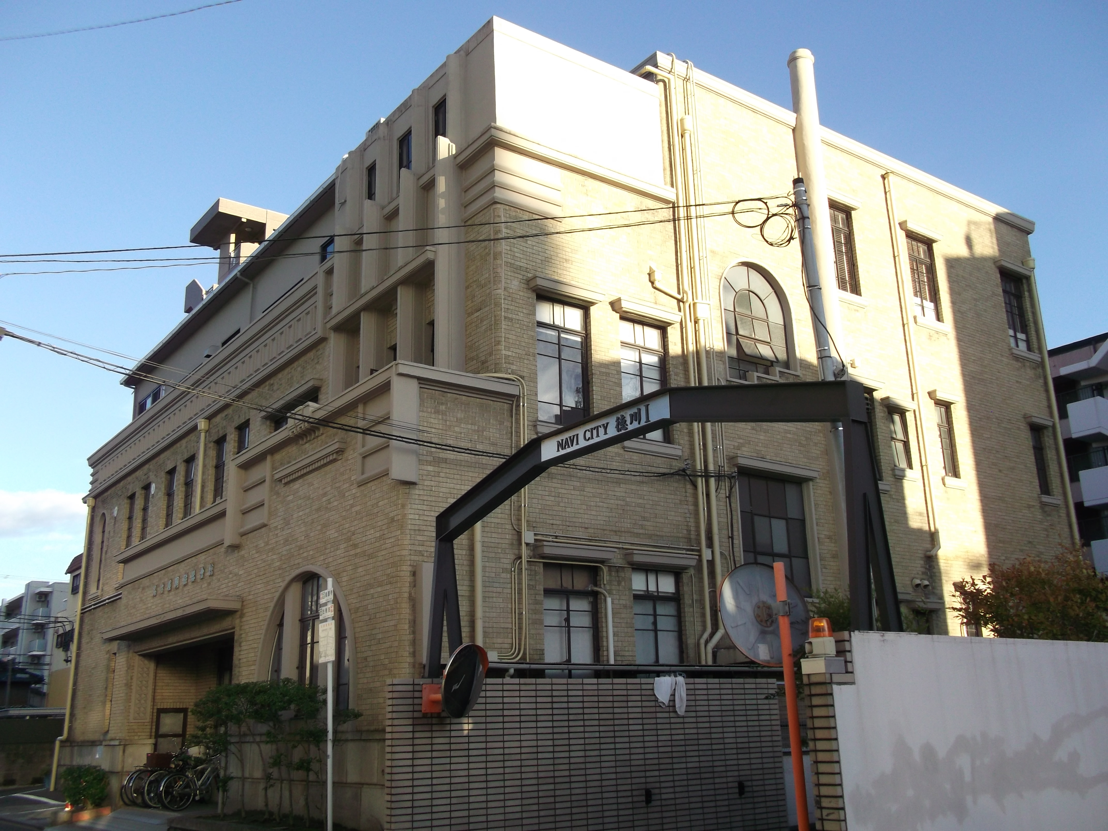 名古屋市東区徳川一丁目の名古屋陶磁器会館を北側公道西側より撮影